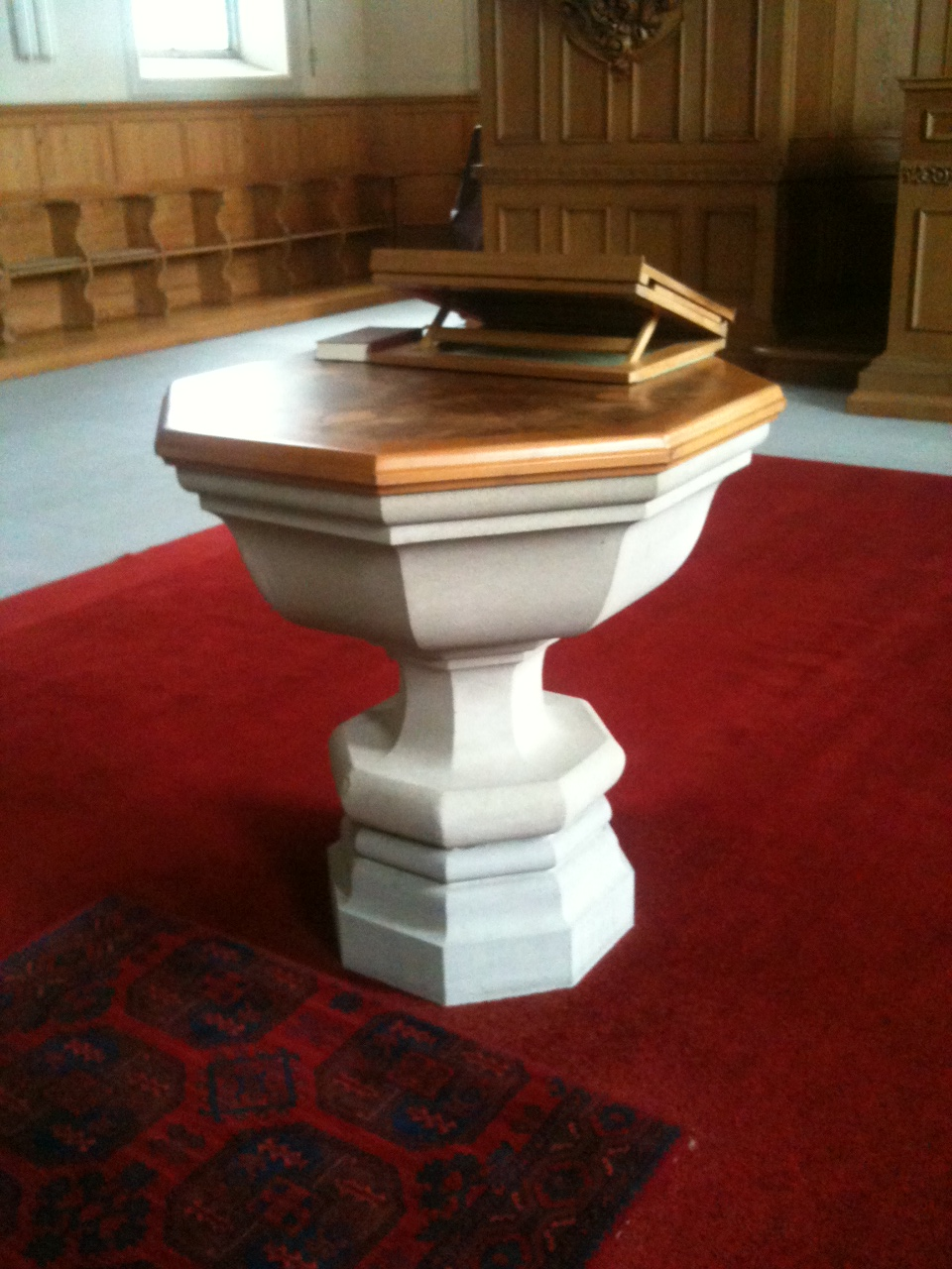 Taufstein in der reformierten Kirche Gais AR